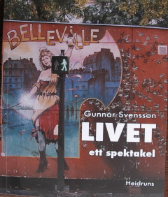 Bokomslag till Livet, ett spektakel